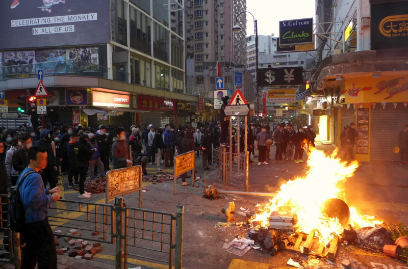 Soy Street Protestors vs Police force